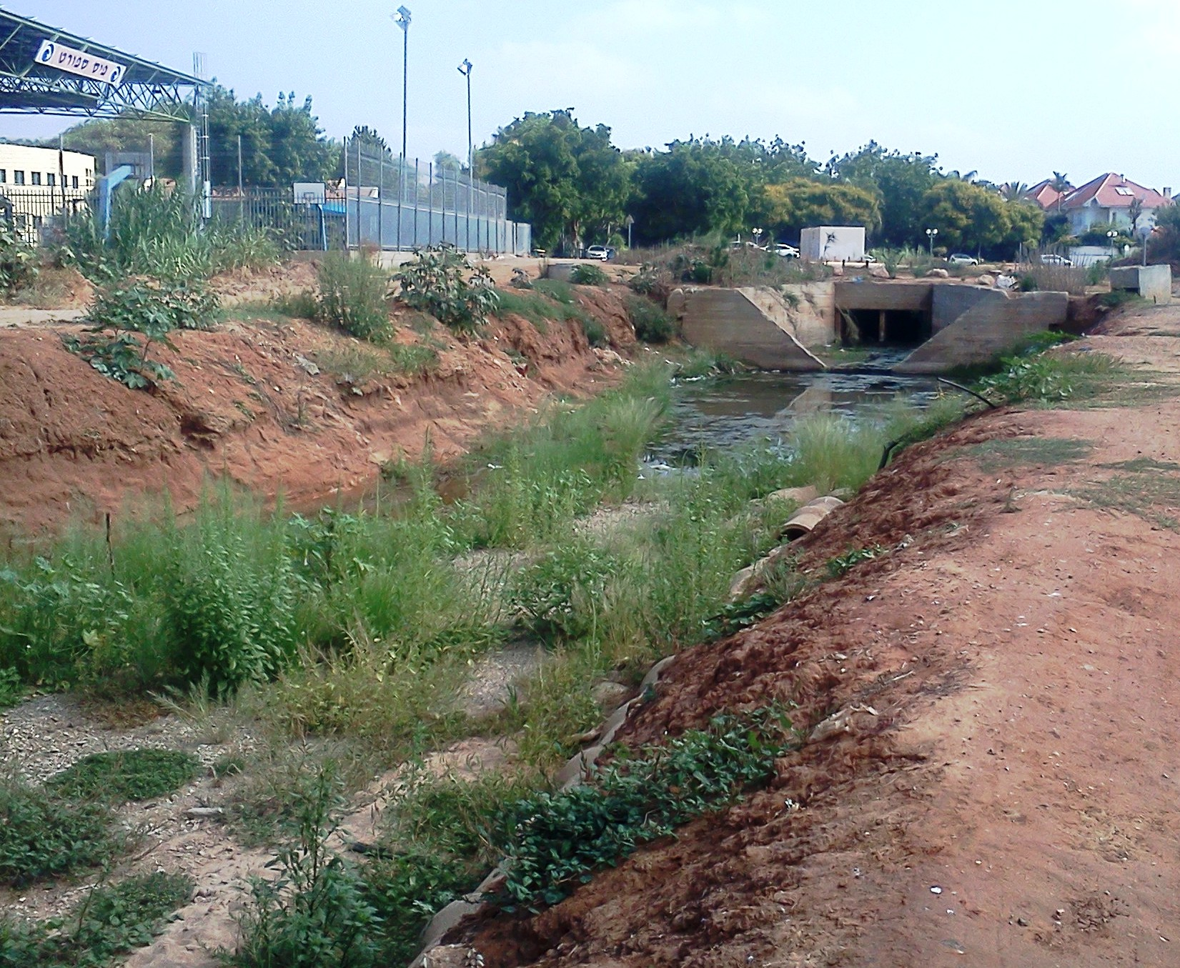 נחל הדר חוזר לפני האדמה